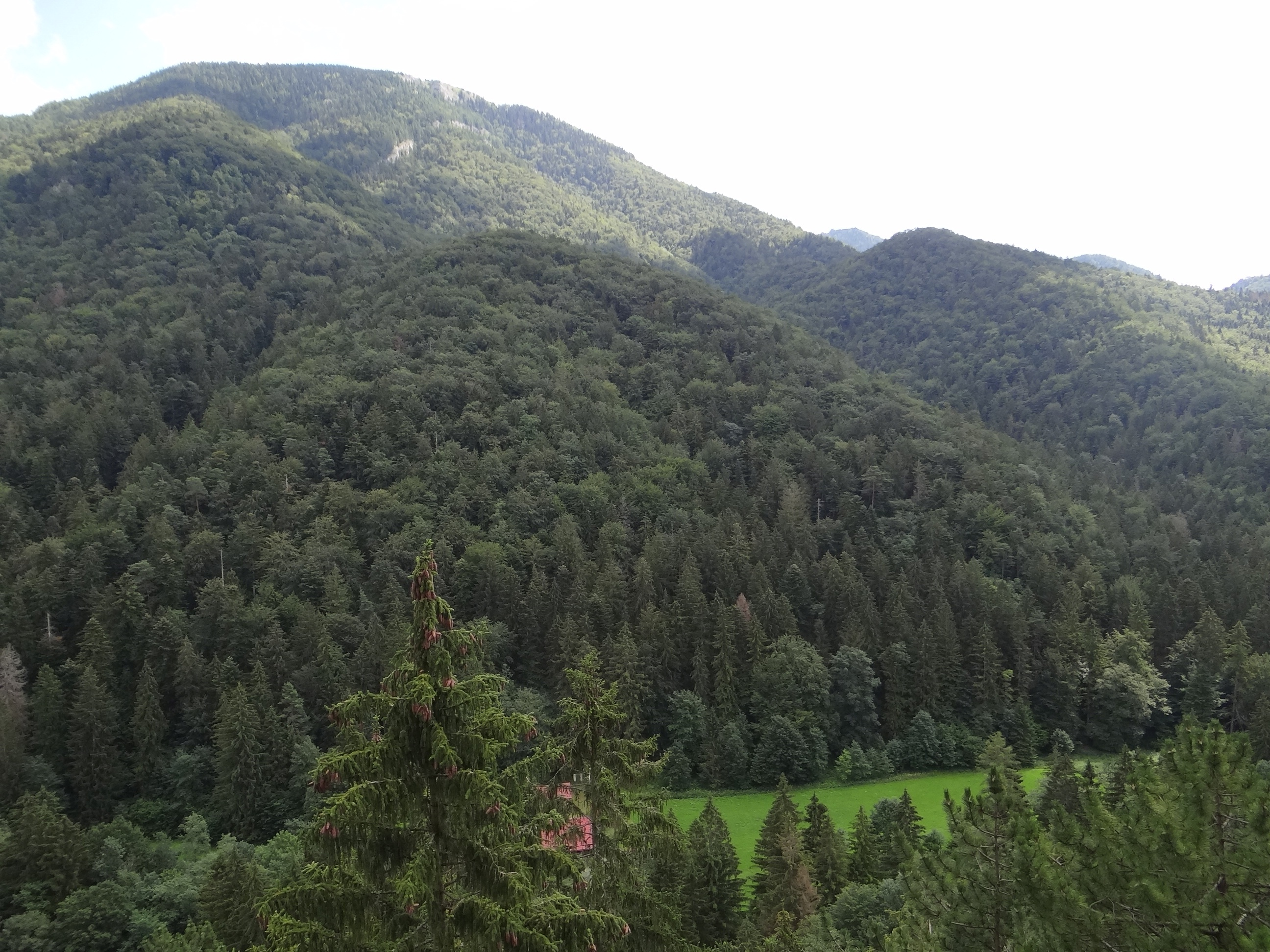 Widok z Zamku Blatnica. Widoczna Gaderská dolina, Tlstá. Wcinają się w nią dwi dolinki: Sokolovo (po lewej) i Vapenná dolina (po prawej)